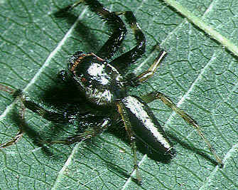 male Telamonia vlijmi from Okinawa.